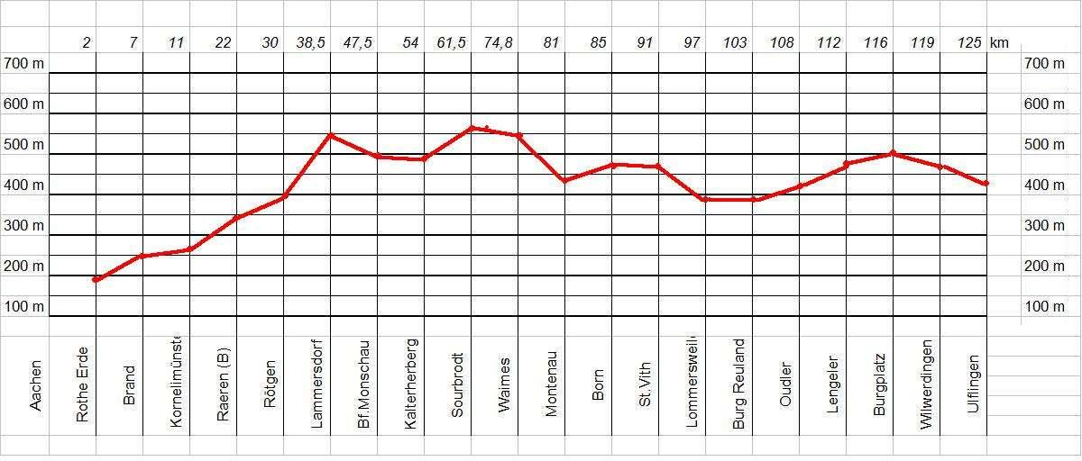 ausgewählte Höhen- und Distanzangaben,Vennbahn bzw. Vennbahnradweg